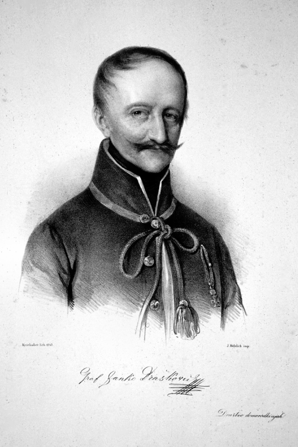 Janko Drašković von Trakošćan (1770–1856), kroatischer Gelehrter, Reformator und Politiker.